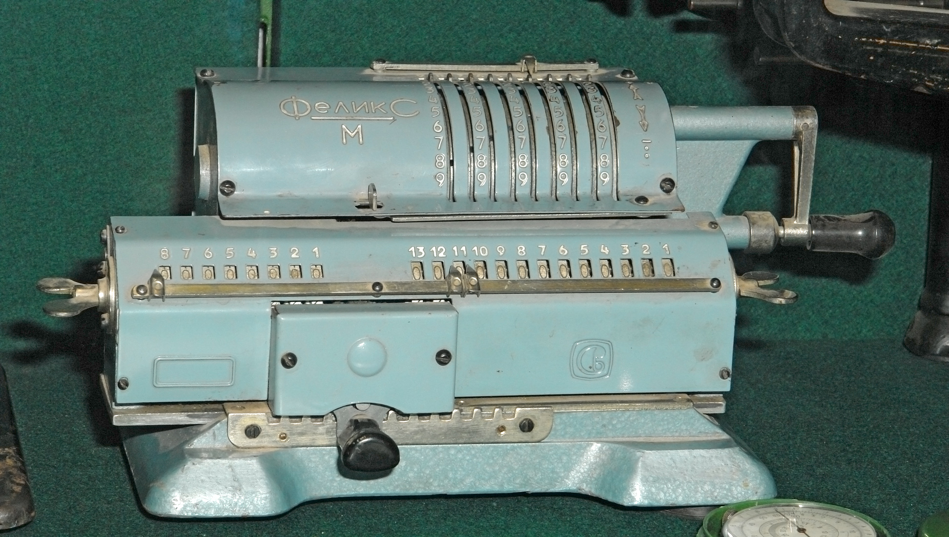 Счётная машинка (арифмометр) Феликс-М. Музей Воды, Санкт-Петербург